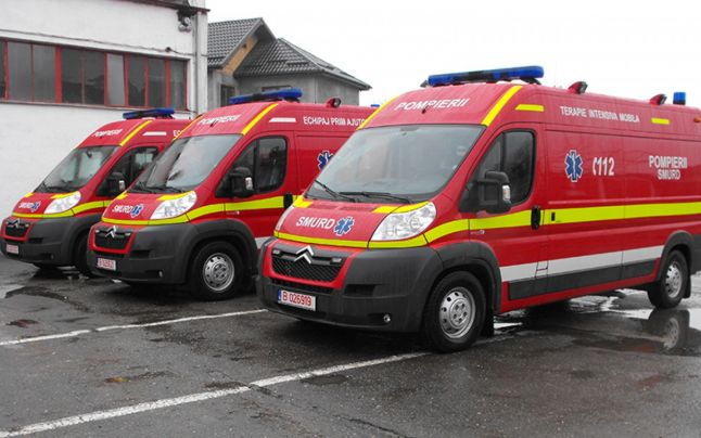 Smurd ambulances Romania